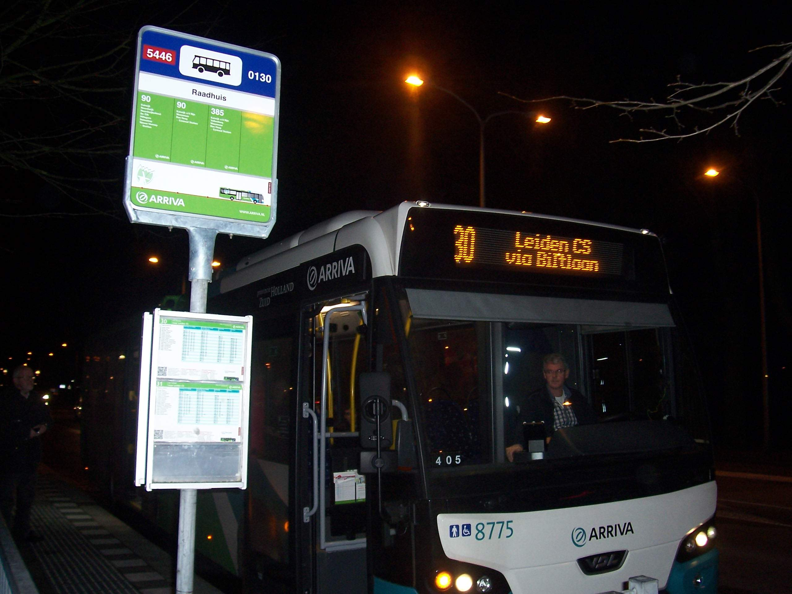 Buslijn 30, Katwijk naar Leiden, met bord 'Raadhuis' in de avond. 31 jan. 2012 19.40h. Arriva